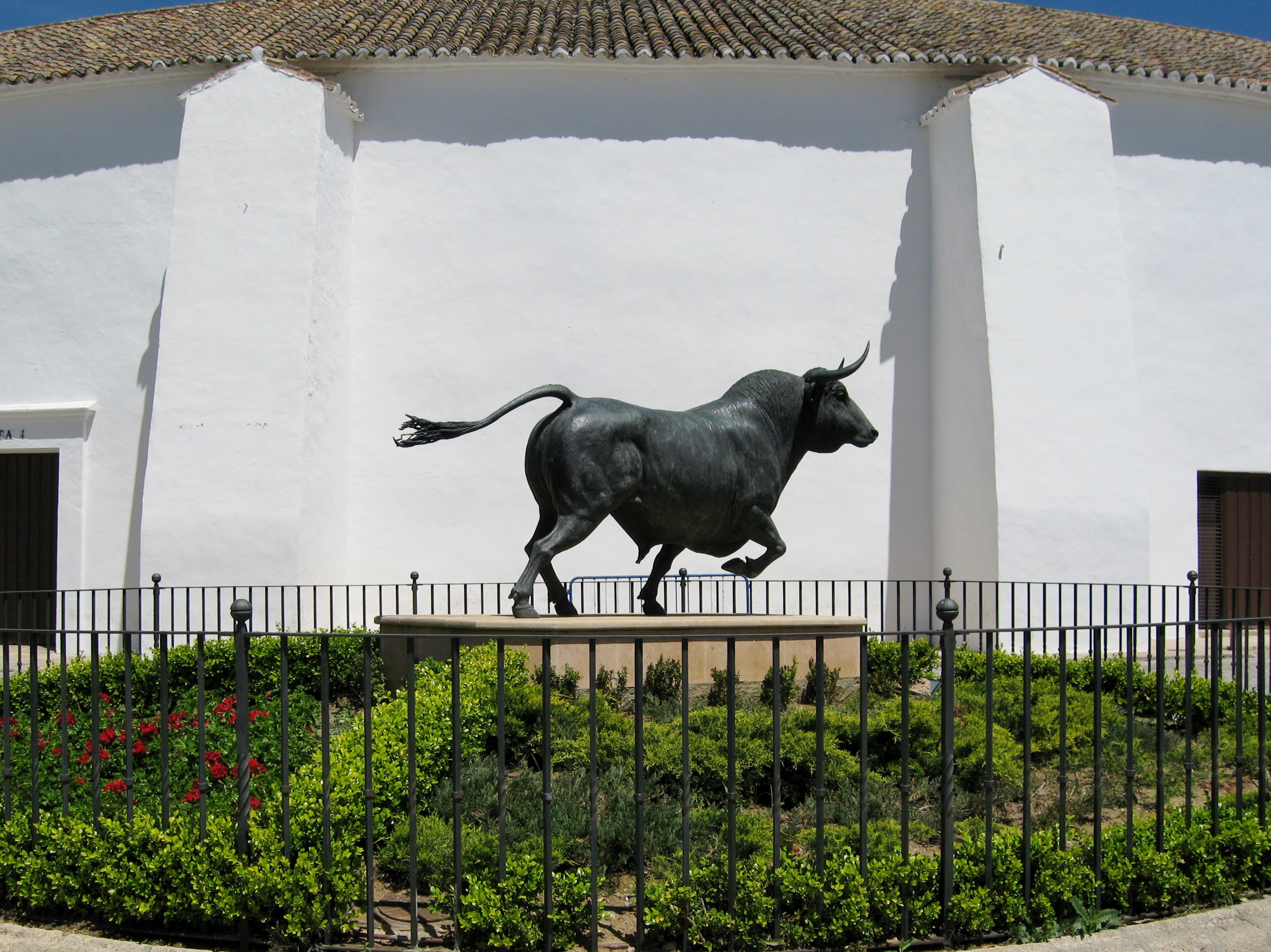 Stierplastik vor der Stierkampfarena von Ronda, Provinz Málaga, Andalusien, Spanien